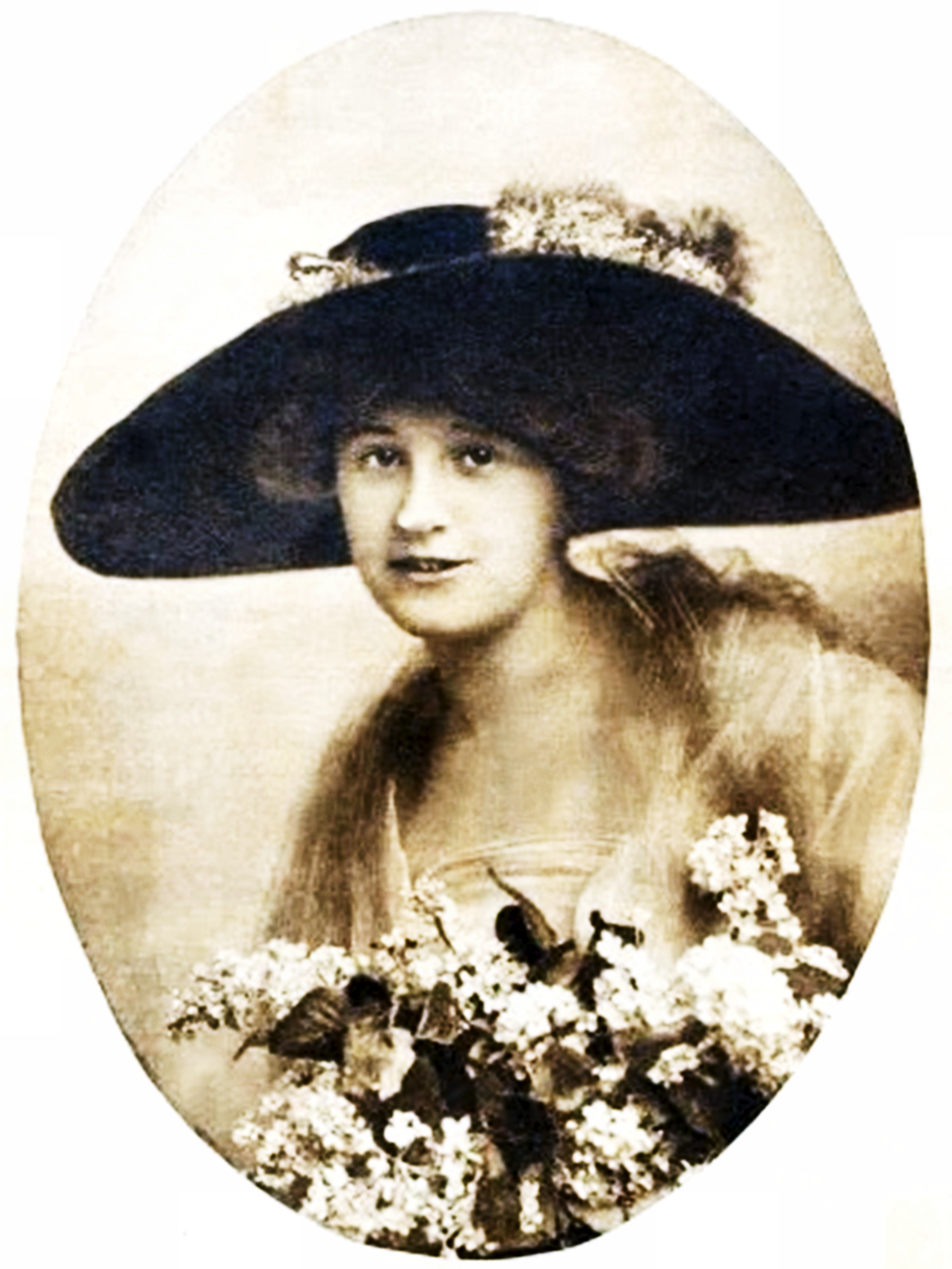 Marietta von Styrcea, geb. Johanny, österr. Schauspielerin